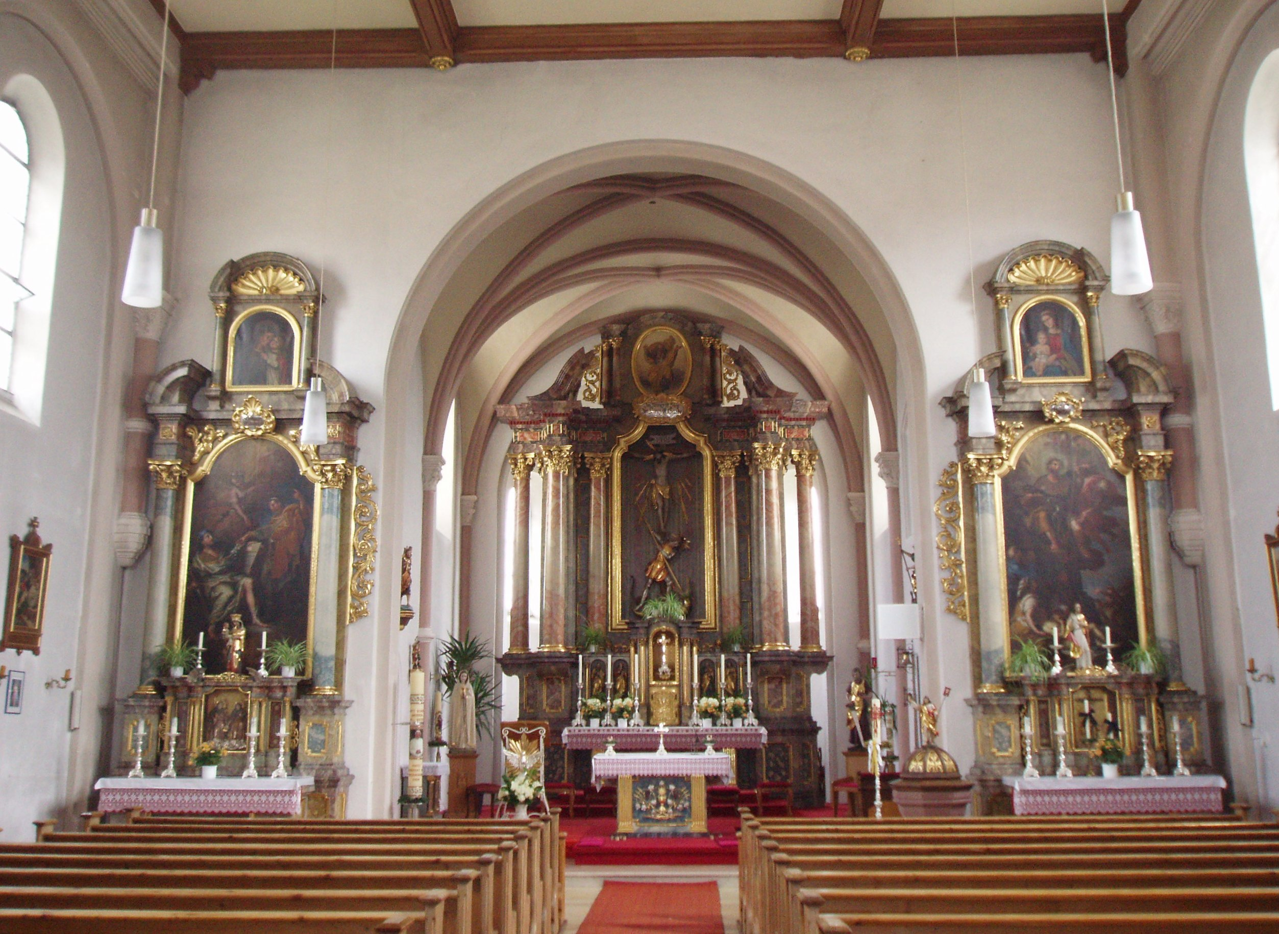 Oberdolling,_katholische_Pfarrkirche_St._Georg,_Innenansicht